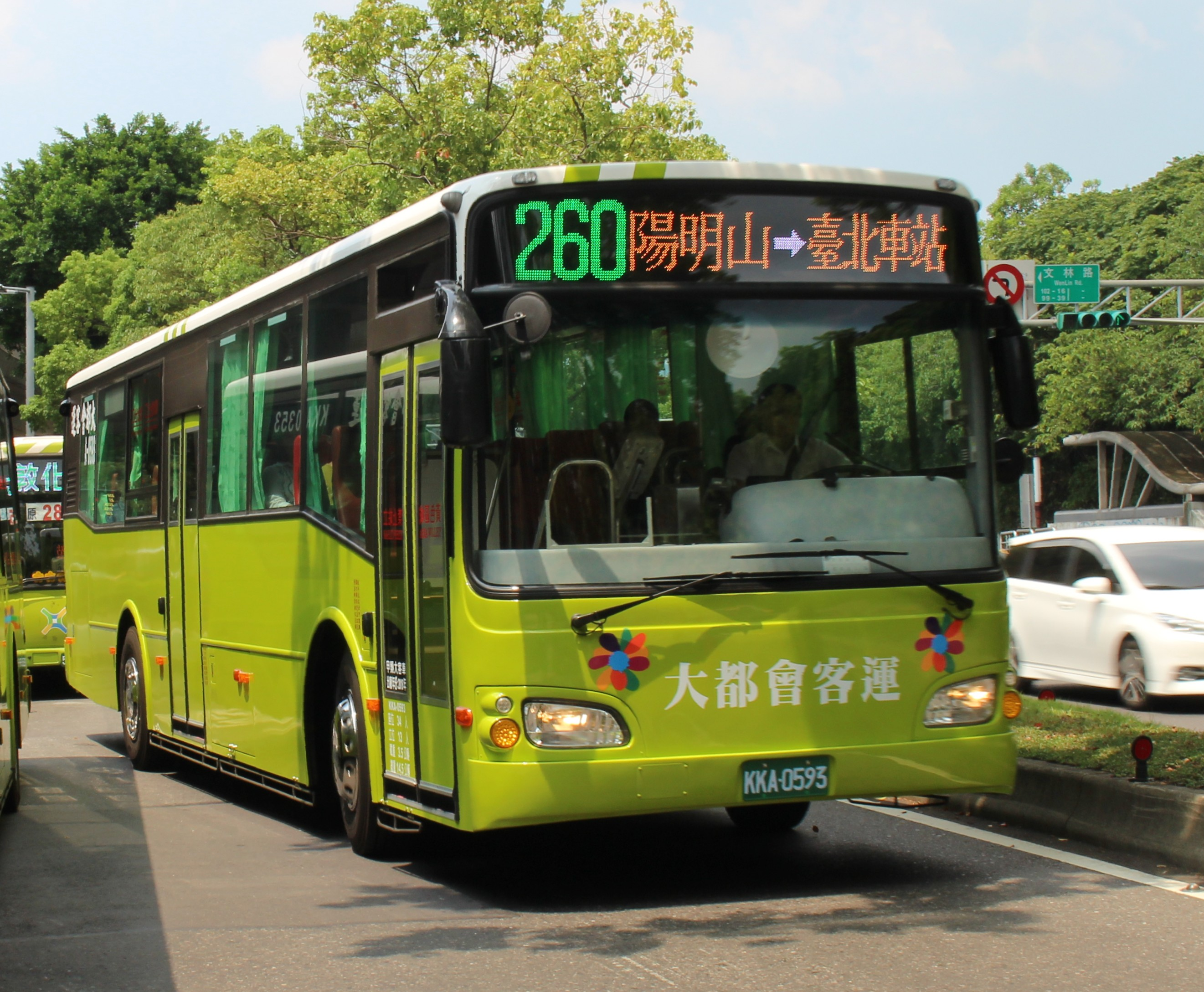 大都會客運KKA-0593 260區間車